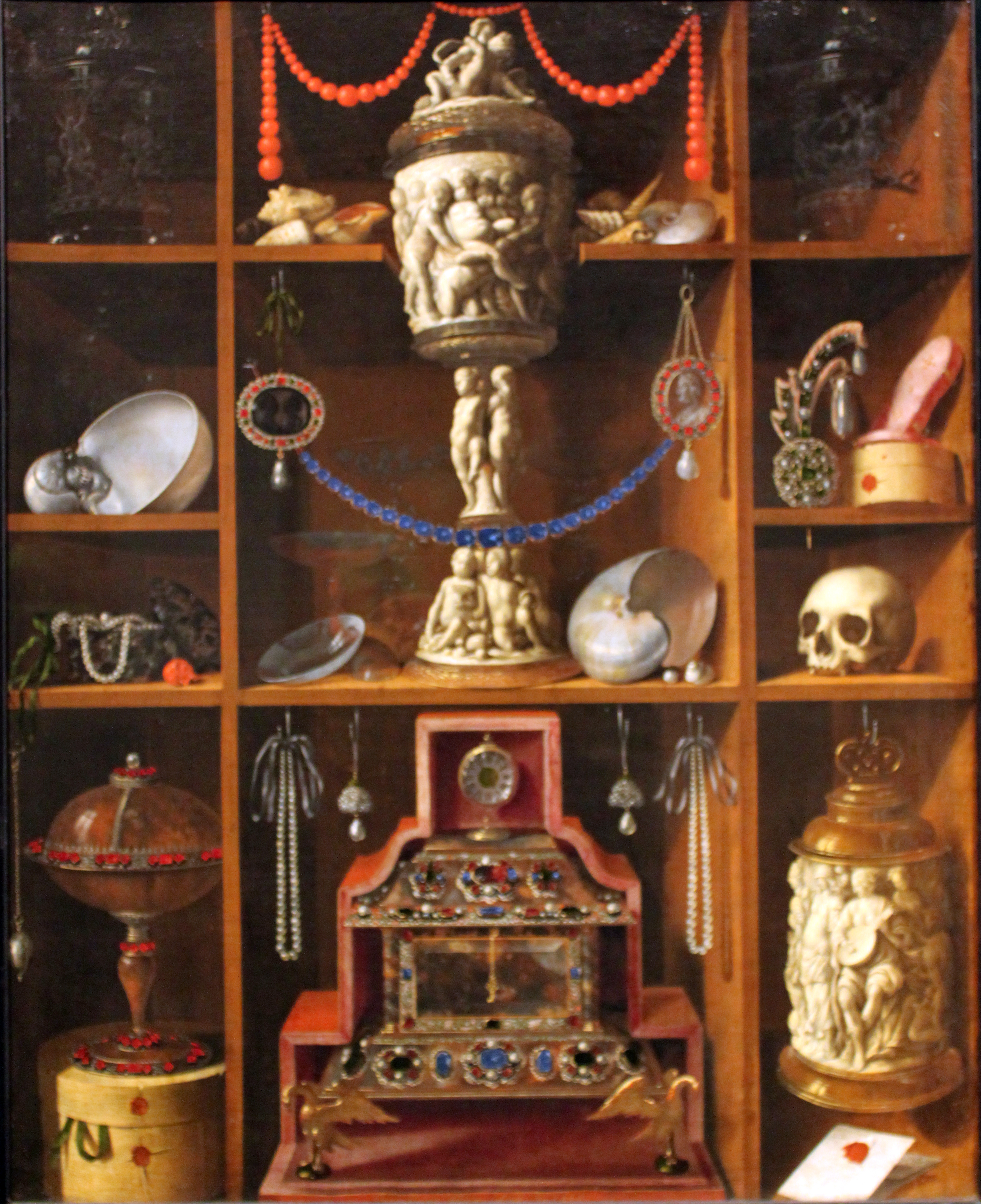 Stilleben